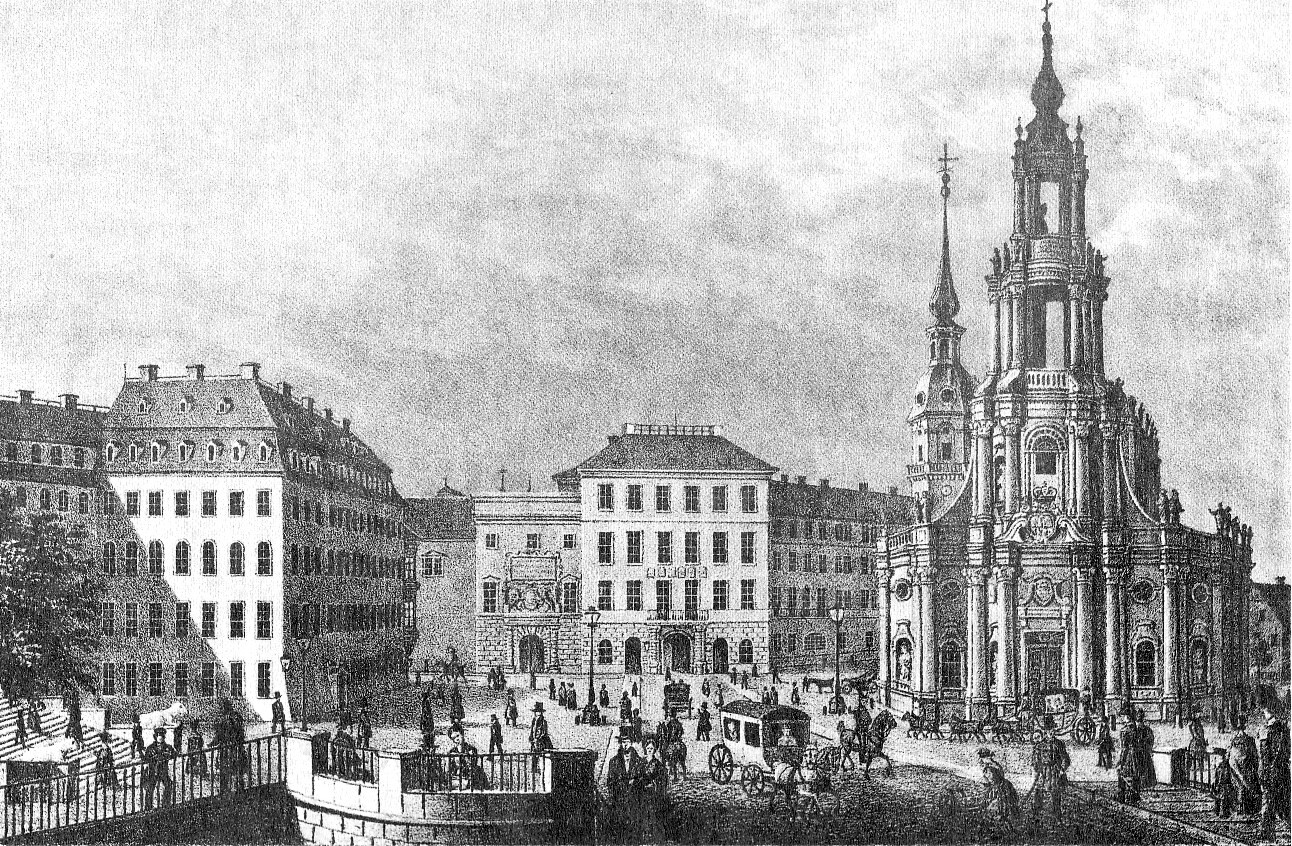 Historische Ansicht von Dresden mit der Hofkirche am Schlossplatz. Stahlstich.